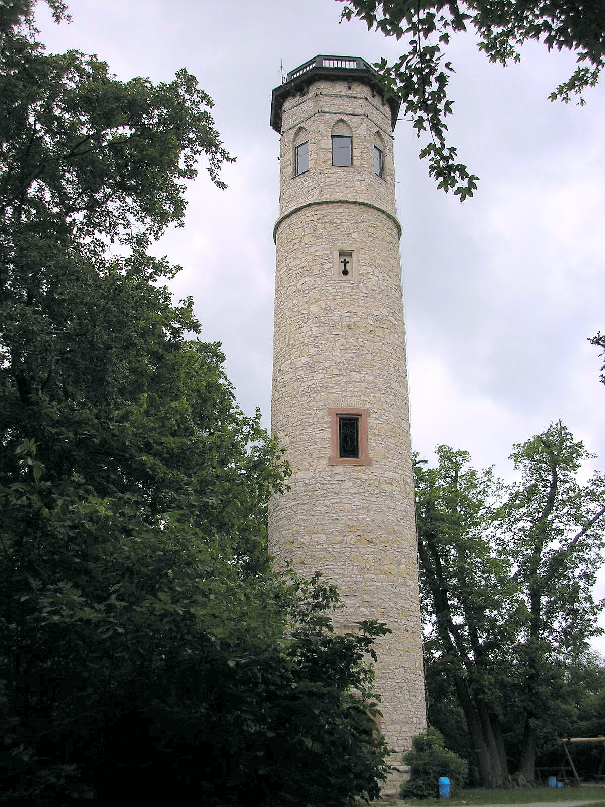 Der Paulinenturm bei Bad Berka (Thüringen).